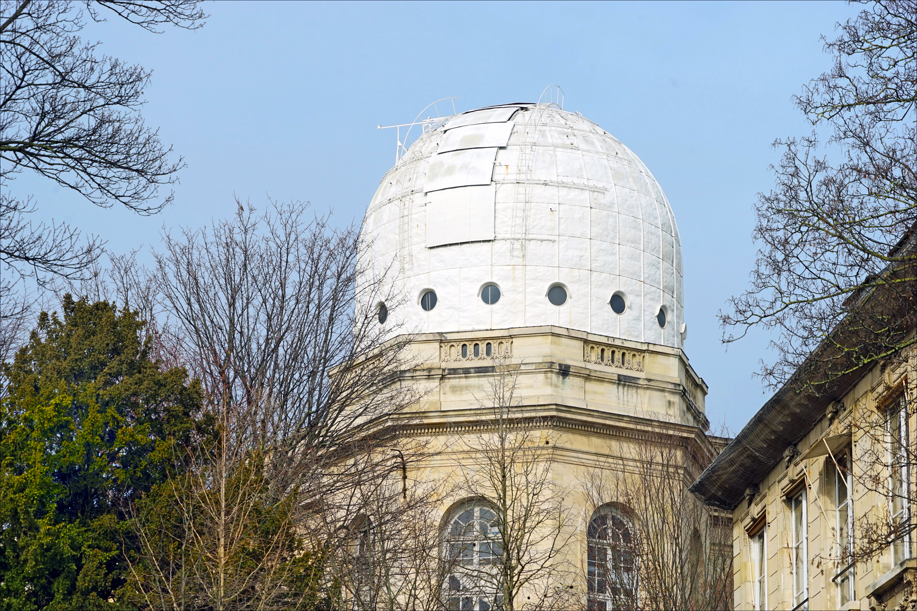 La création de l'observatoire royal à Paris a été décidée en 1666 sous le règne de Louis XIV. C'est l'architecte Claude Perrault qui est chargé de sa conception dès 1667. Giovanni Domenico Cassini en est le premier directeur en 1669. Article de Wikipedia Voir l'observatoire en construction sur une gravure ancienne (photo dalbera)